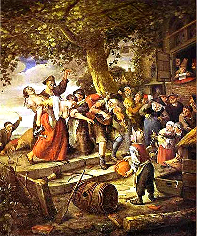 La femme ivre 1673